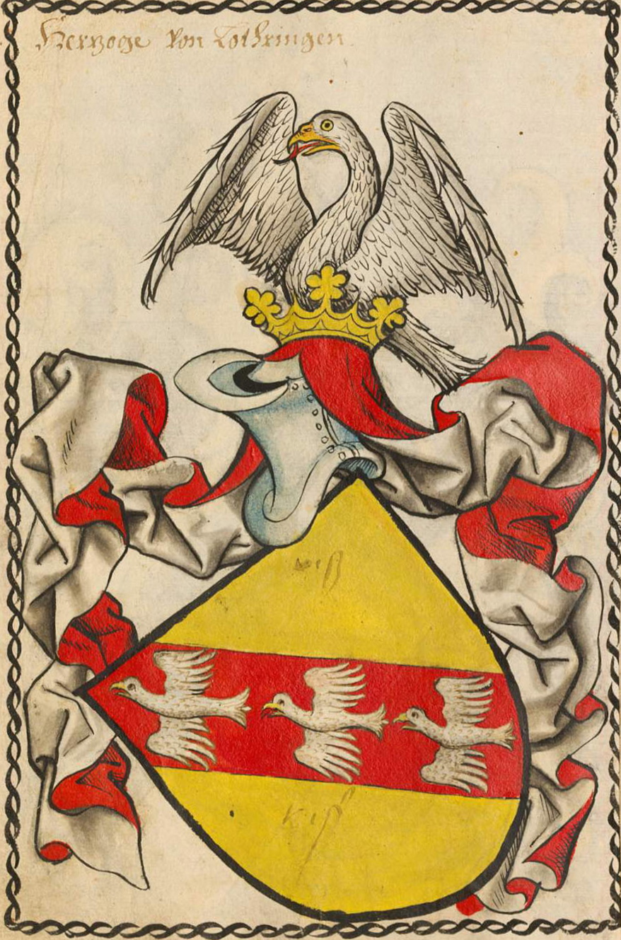 Scheibler'sches Wappenbuch , älterer Teil Herzog von Lothringen